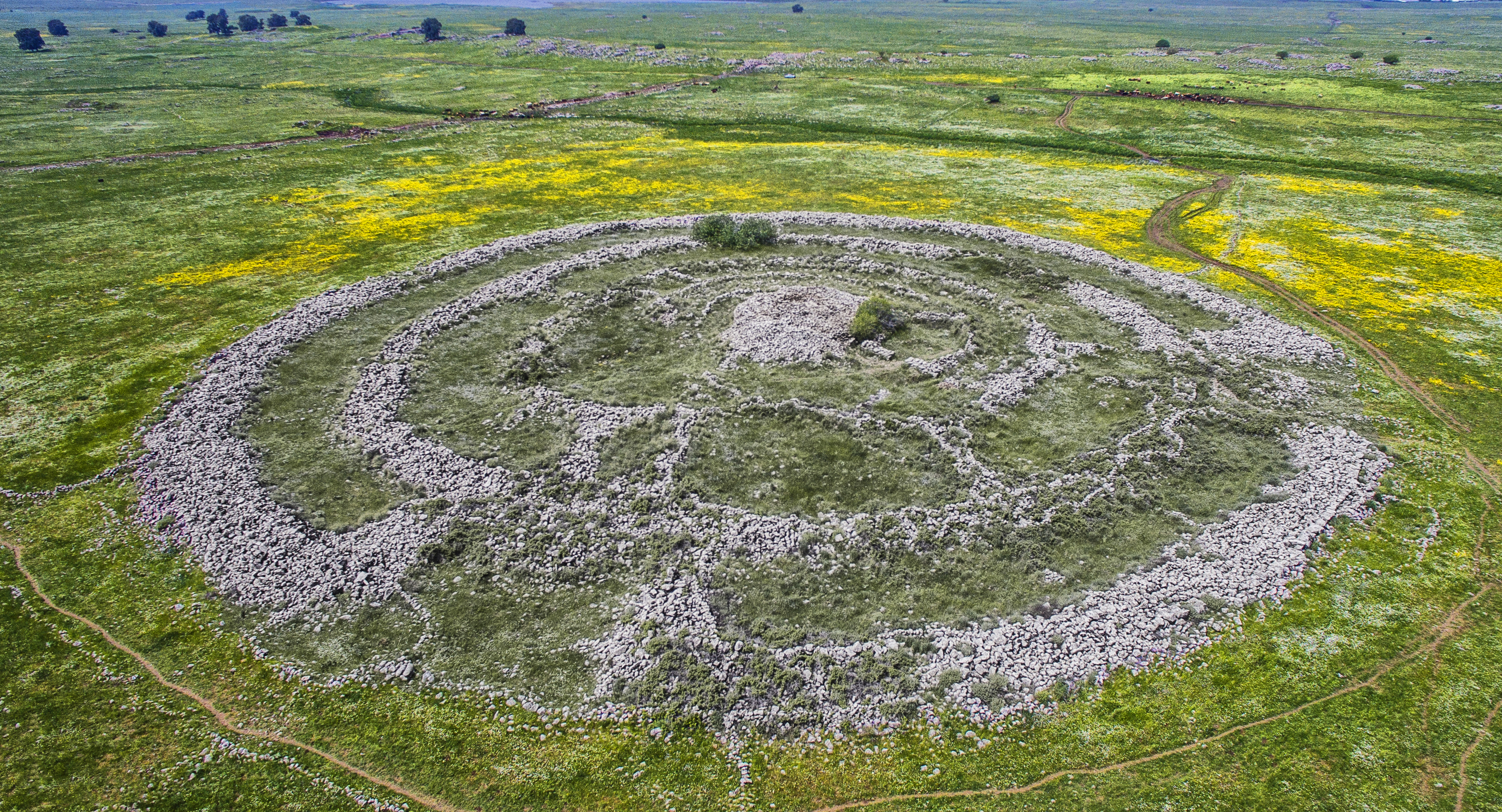 גלגל רפאים המוכר גם כגילגל רפאים (בערבית: רֻגְ'ם אל הִרי, שמשמעותו גל האבנים של חתולי הבר) הוא רוגם ומעגל אבנים ומונומנט מגליתי עתיק הנמצא ברמת הגולן, בקרבת מושב יונתן וכ-16 קילומטרים מזרחית לחופה הצפוני של הכנרת, במרכז מישור נרחב המכוסה מאות דולמנים. בקרבת המקום נמצא יישוב קדום מתקופת הברונזה הקדומה.